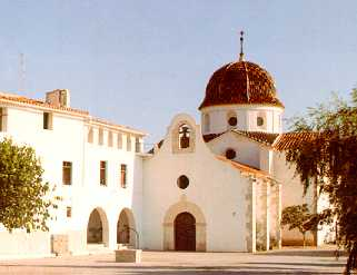 Ermita de la Mare de Déu del Remei situada a Alcanar (Montsià) - Catalunya